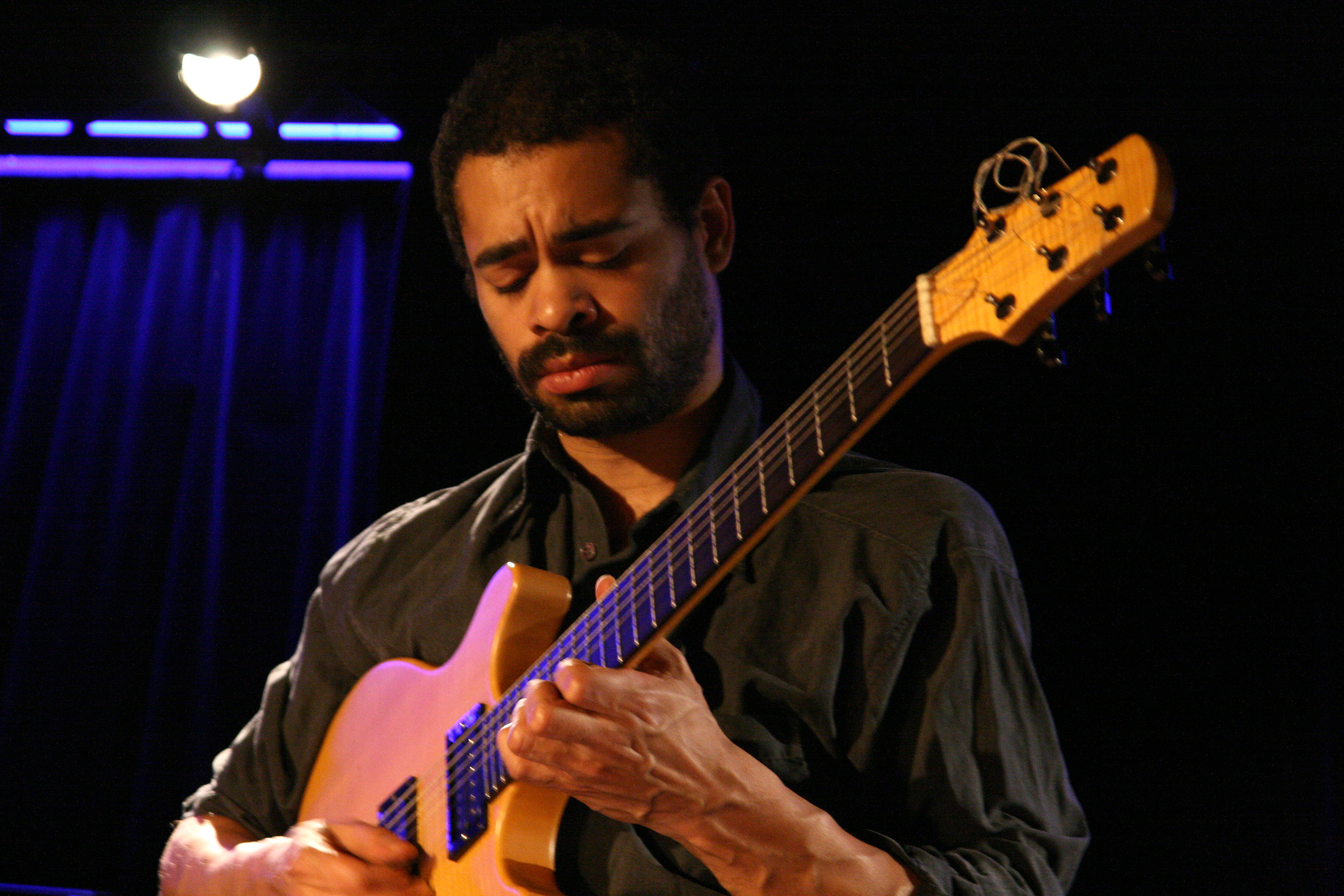 Manu Codjia, jazz guitarist